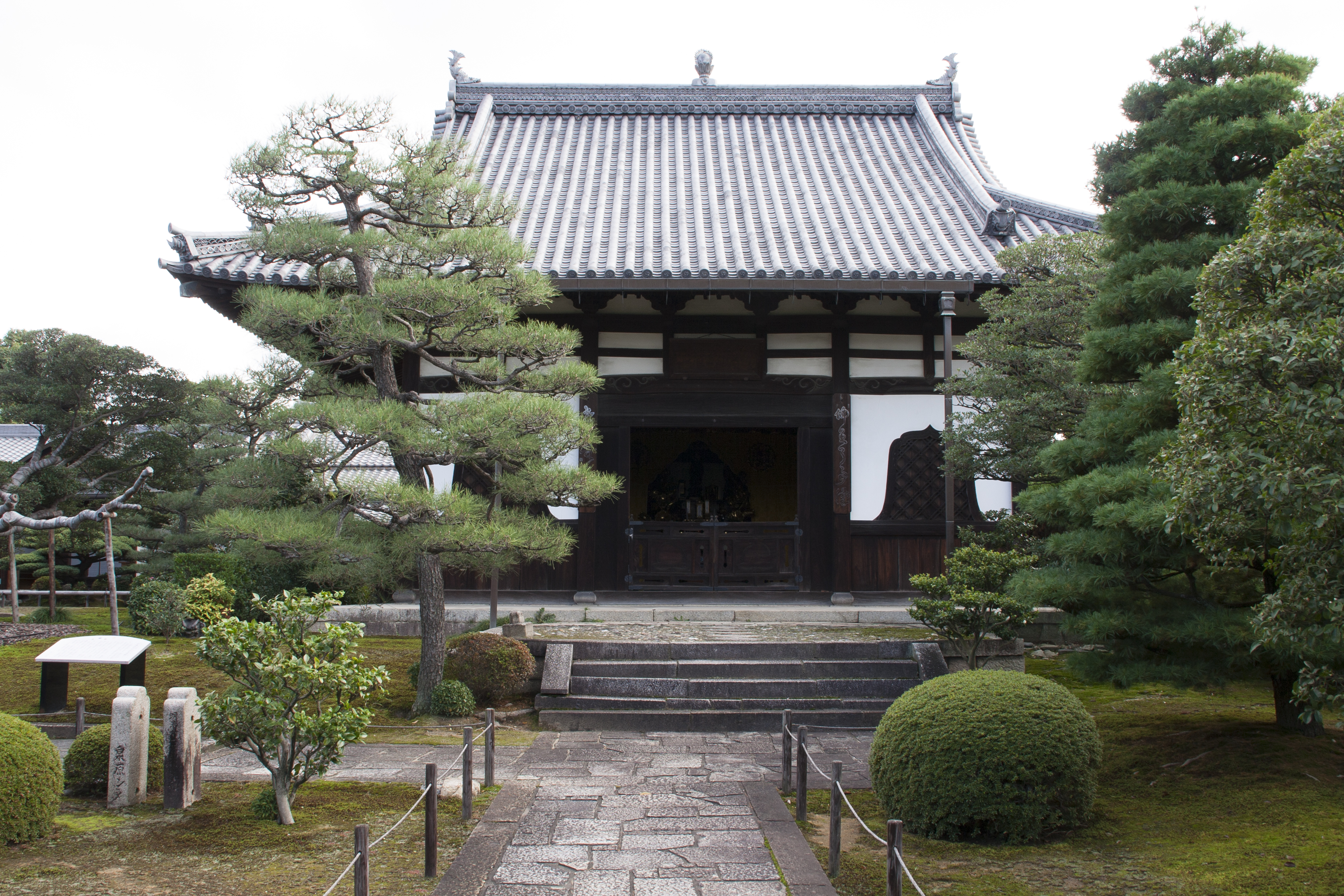 海宝寺 本堂